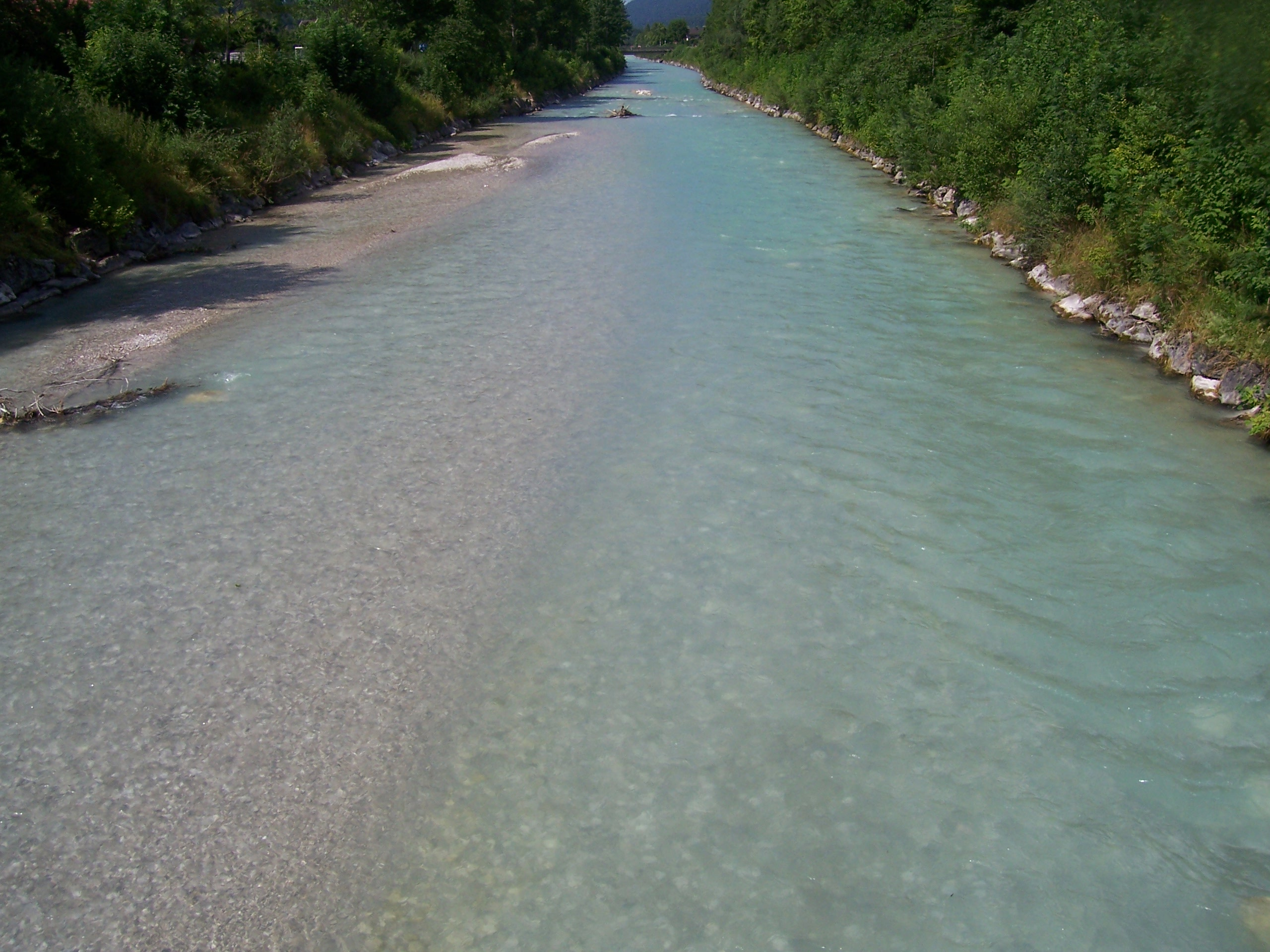 Isar in Mittenwald, türkisgefärbt durch Gletscherwasser